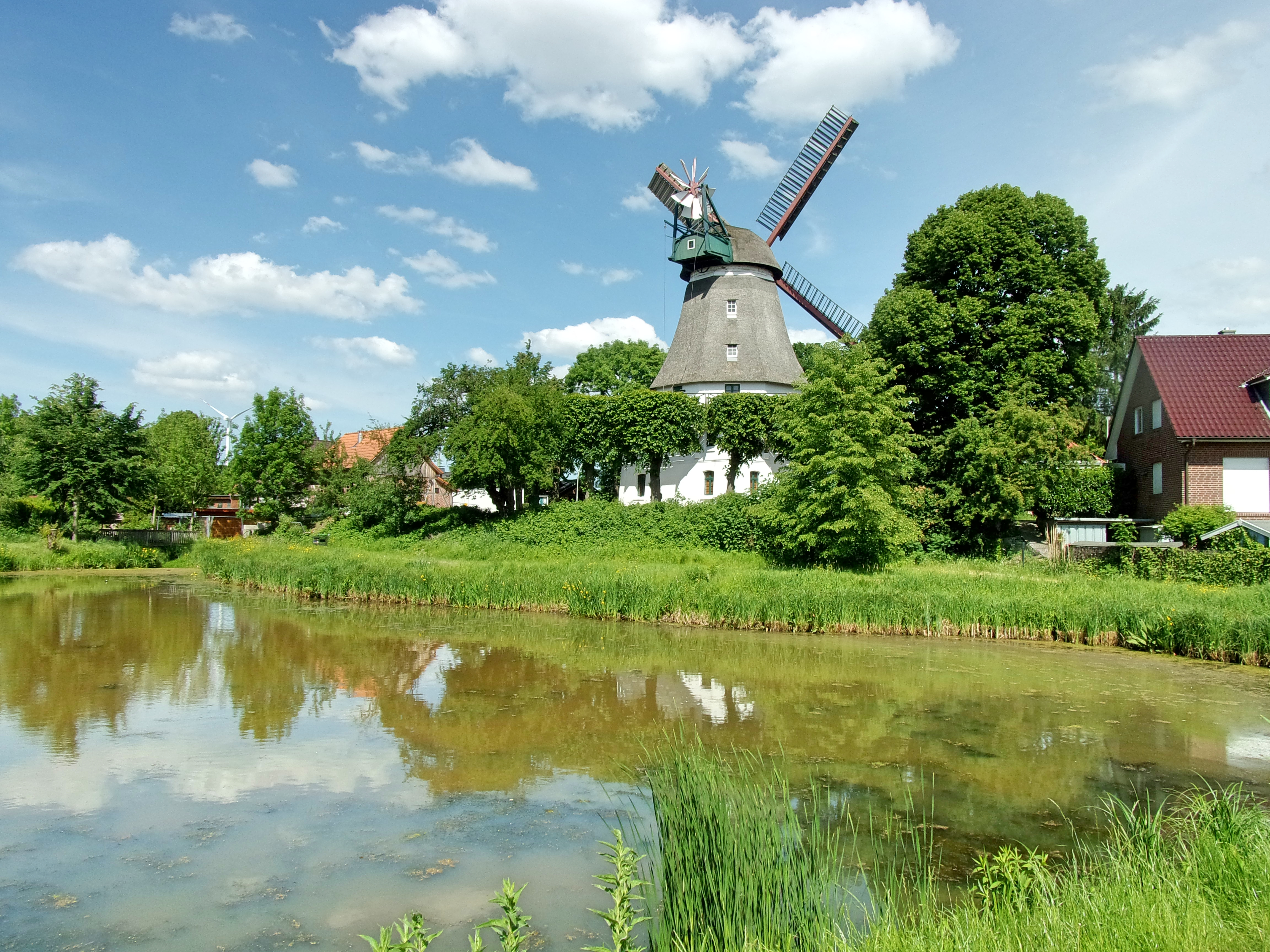 Die Windmühle Johanna mit Ansicht an der Christoph-Cordes-Straße. Die Windmühle stammt aus dem Jahr 1875. Mehr zur Mühle unter folgendem Link: This is a photograph of an architectural monument.